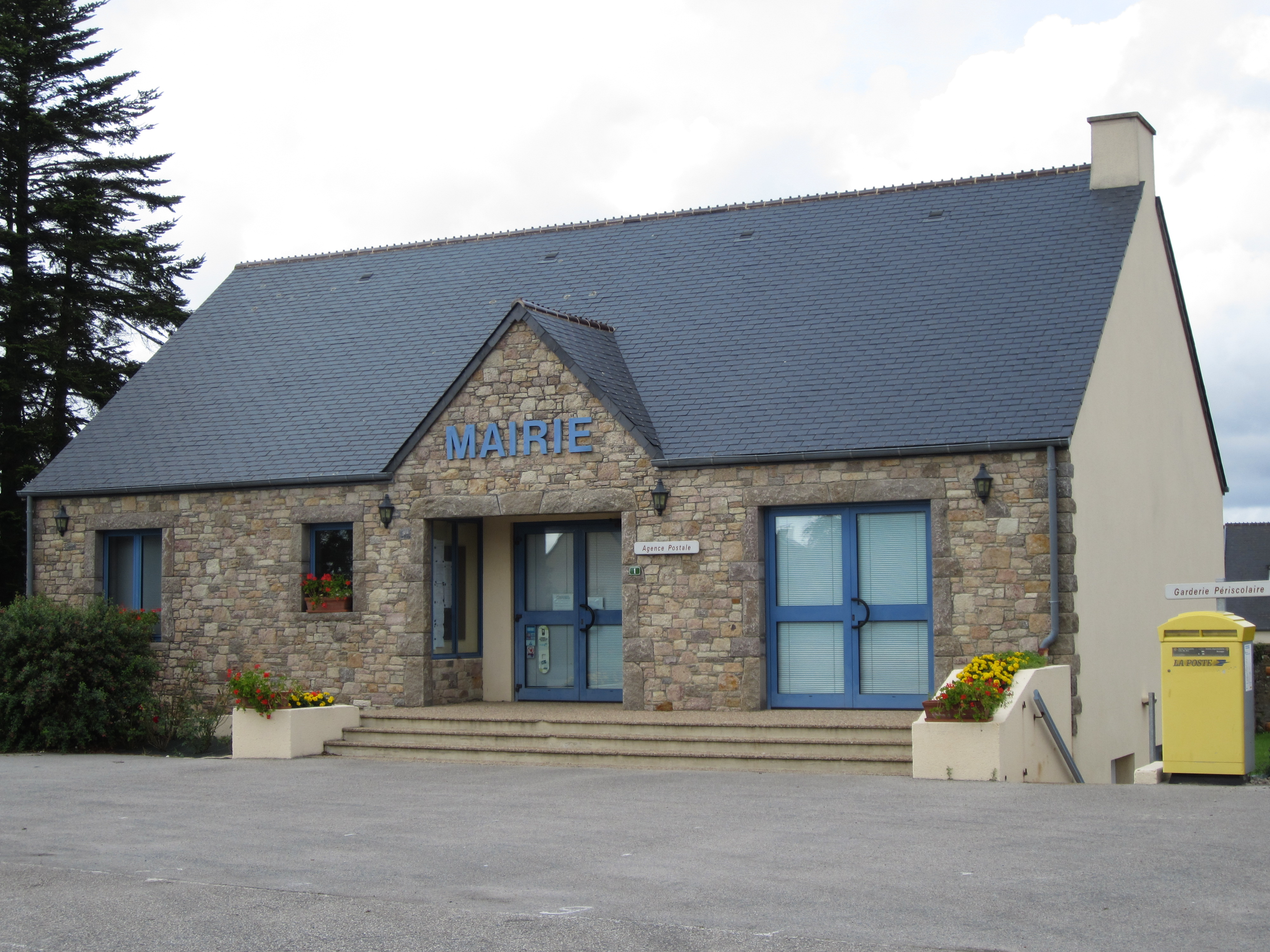 église Saint-Martin de Grosville